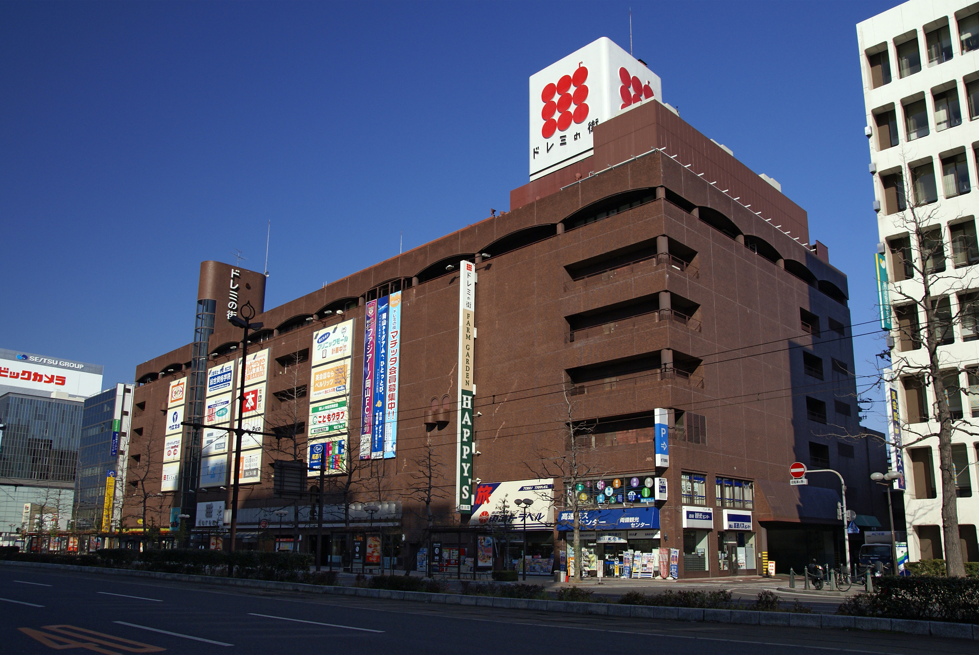 Doremi-no-machi in Okayama, Okayama prefecture, Japan